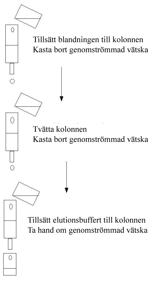 kolonnkromatografi